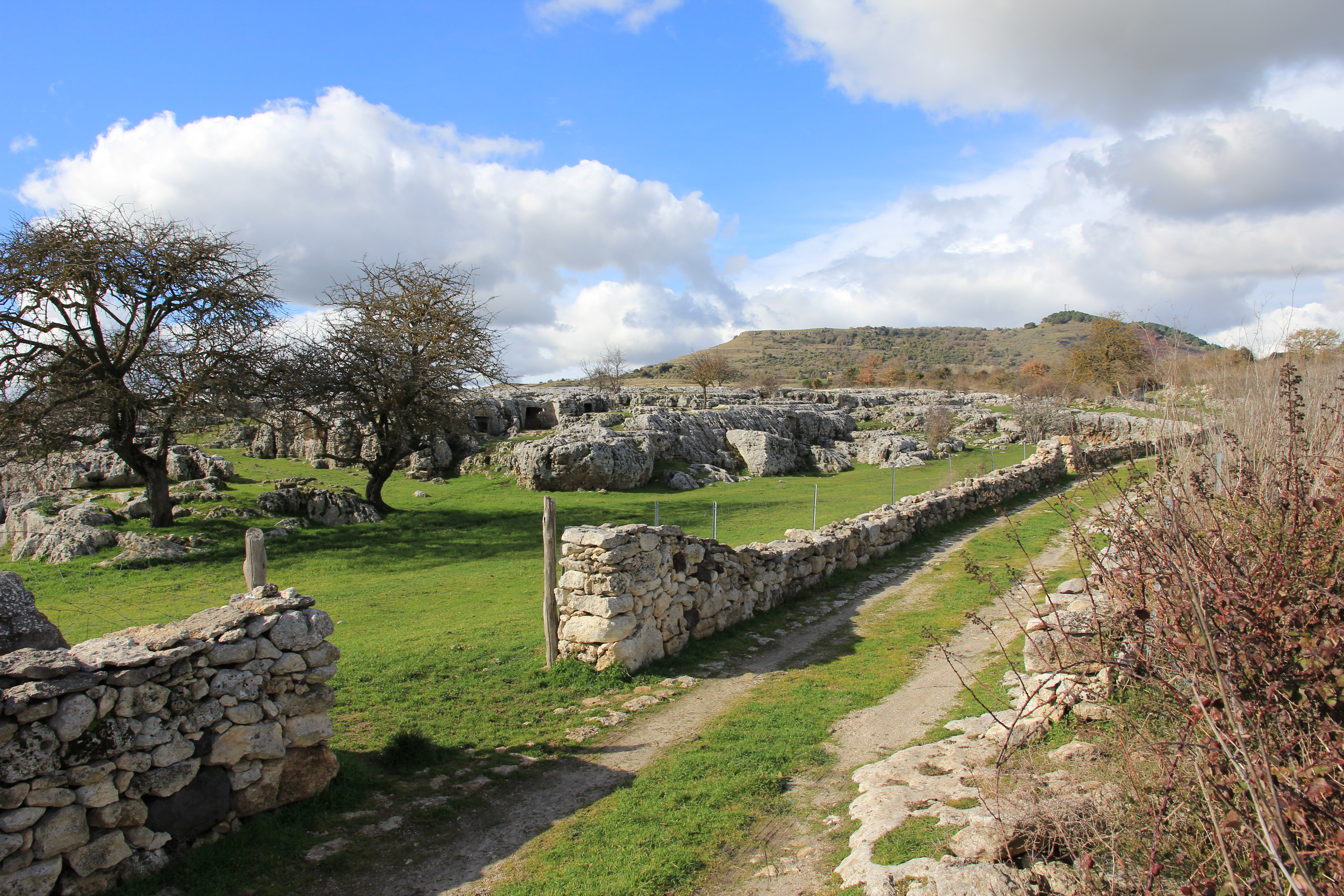 Cheremule - Necropoli di Moseddu